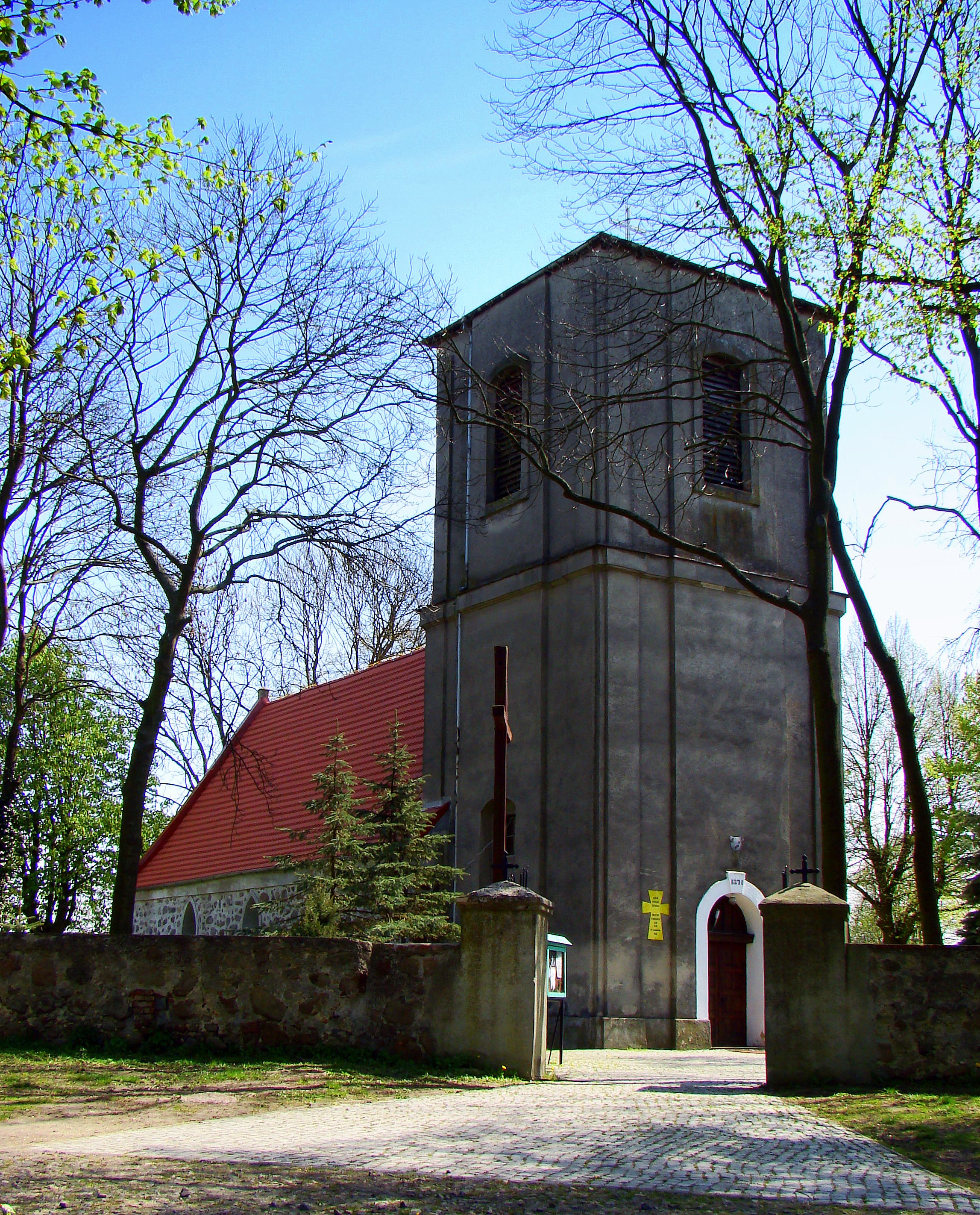 Kościół Św. Trójcy w Kołbaskowie, (Powiat policki, Województwo zachodniopomorskie), Polska